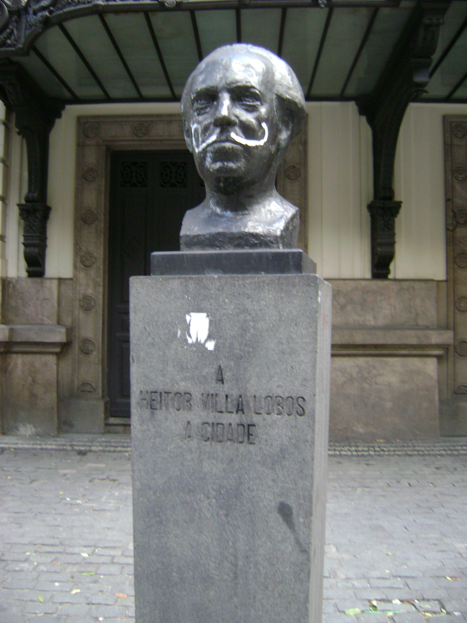 Estátua de Heitor Villa-Lobos no Rio de Janeiro, Brasil.